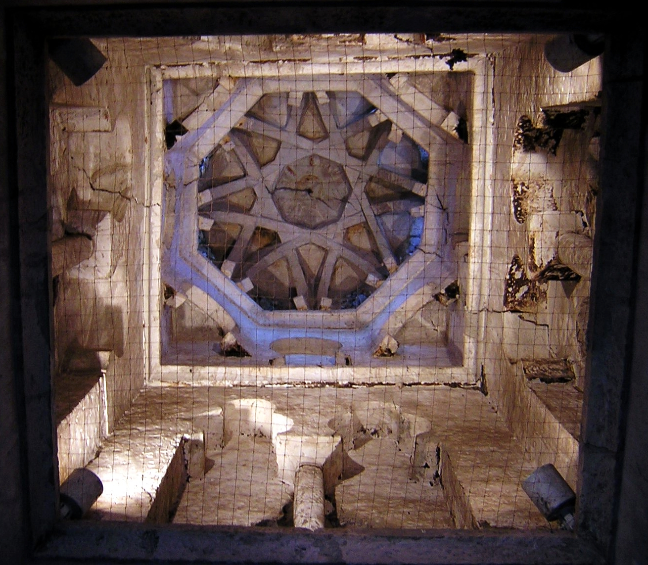 Bóveda de la mezquita Bab al-Mardum de Toledo